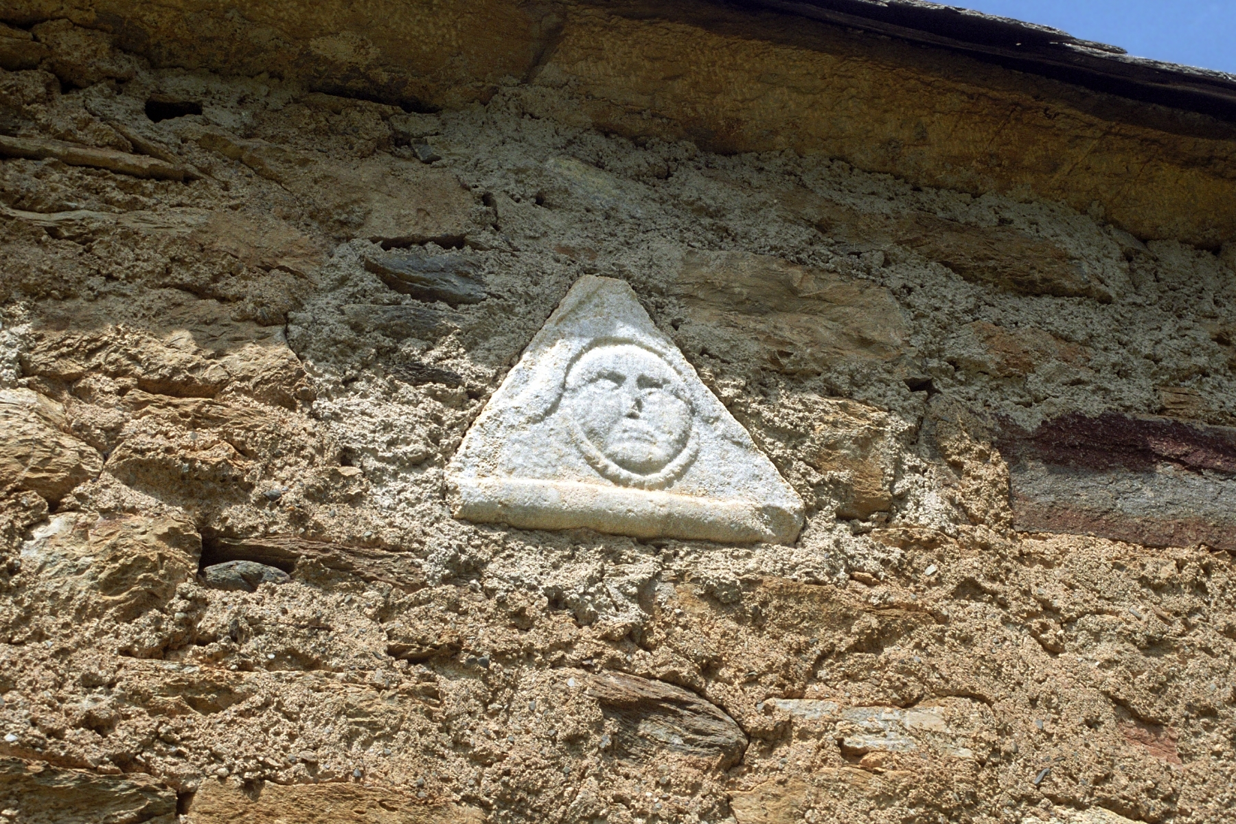 Chapelle Saint-Pé de la Moraine